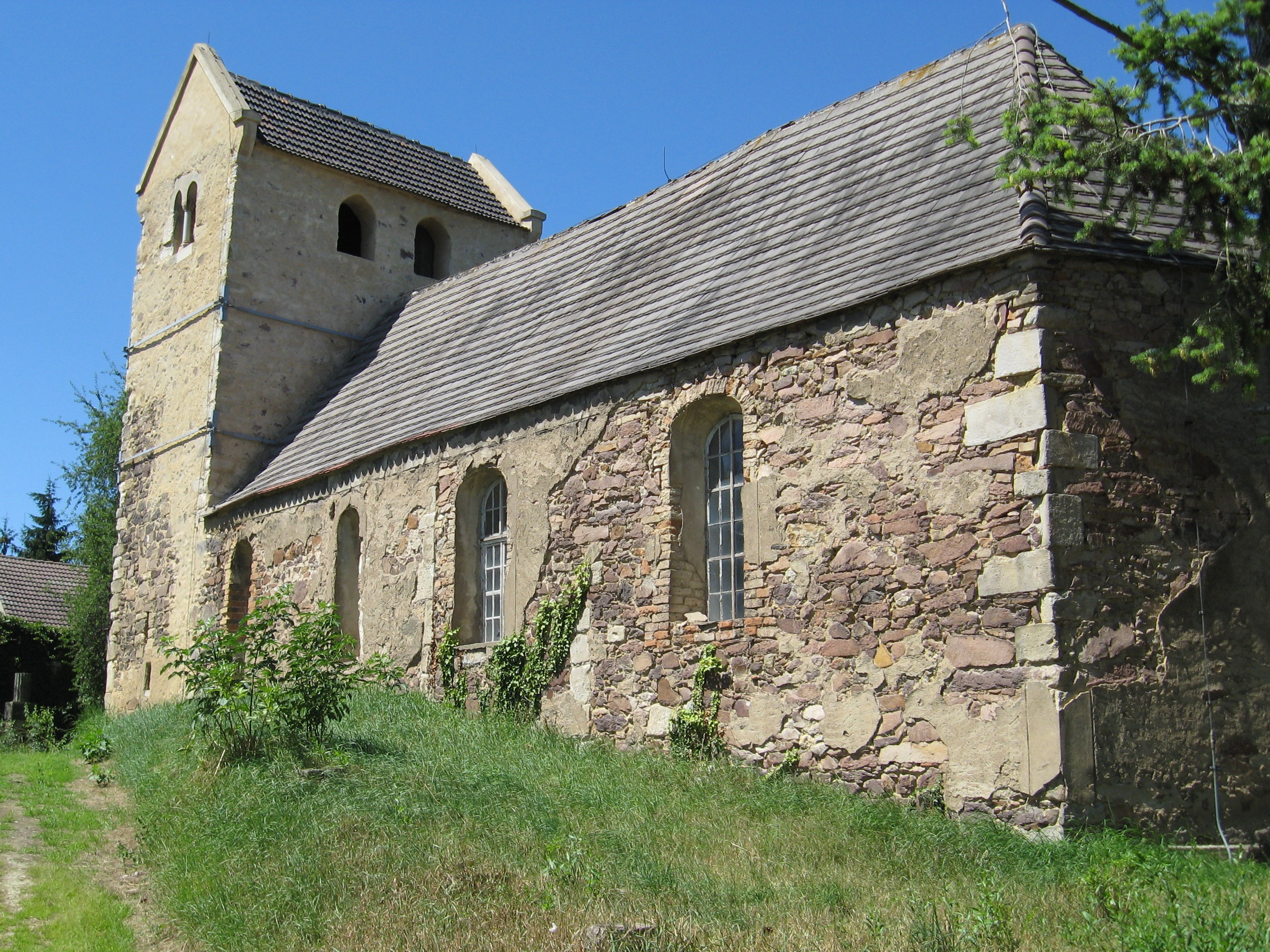 Kirche in Wallwitz Ortsteil Merkewitz, Sachsen-Anhalt.